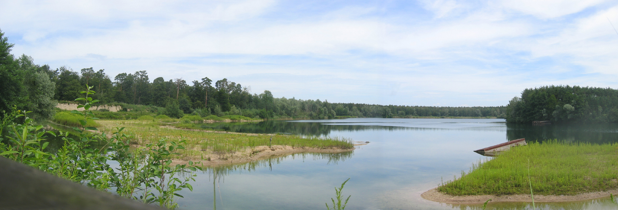 Naturschutzgebiet Kohlplattenschlag bei Graben-Neudorf, Baden-Württemberg; Blick vom südlichen Beobachtungspunkt auf den See